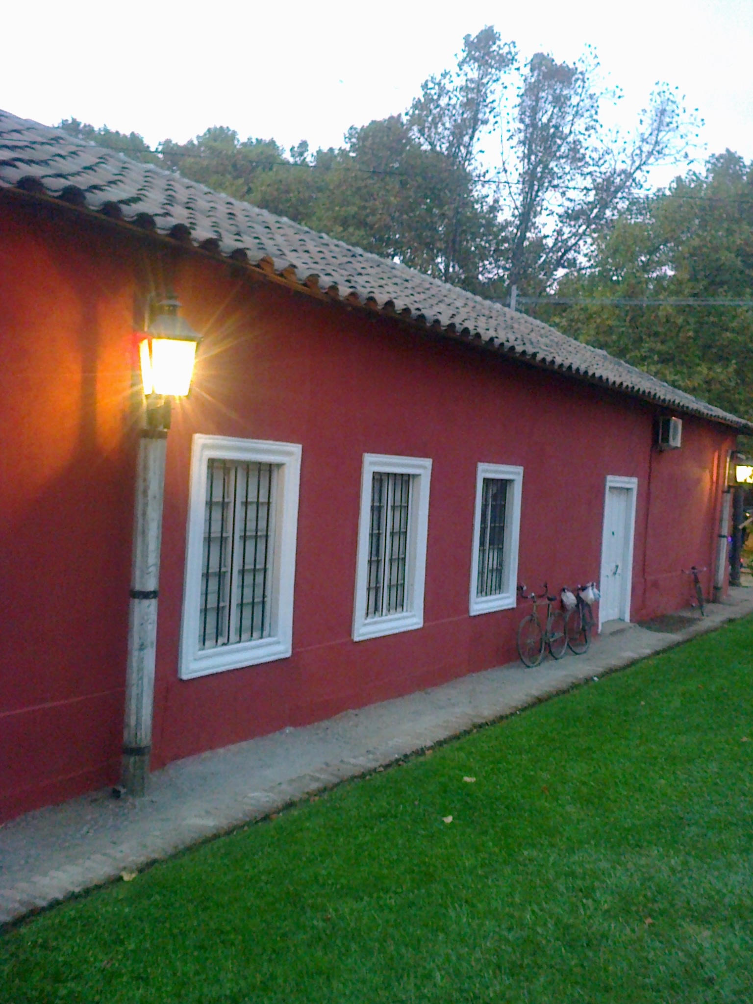 Casa frente a la plazoleta "Max Jara". Forma parte de la Zona Típica "Sector de la Plaza de Armas de Yerbas Buenas". This is a photo of a national monument in Chile: 644